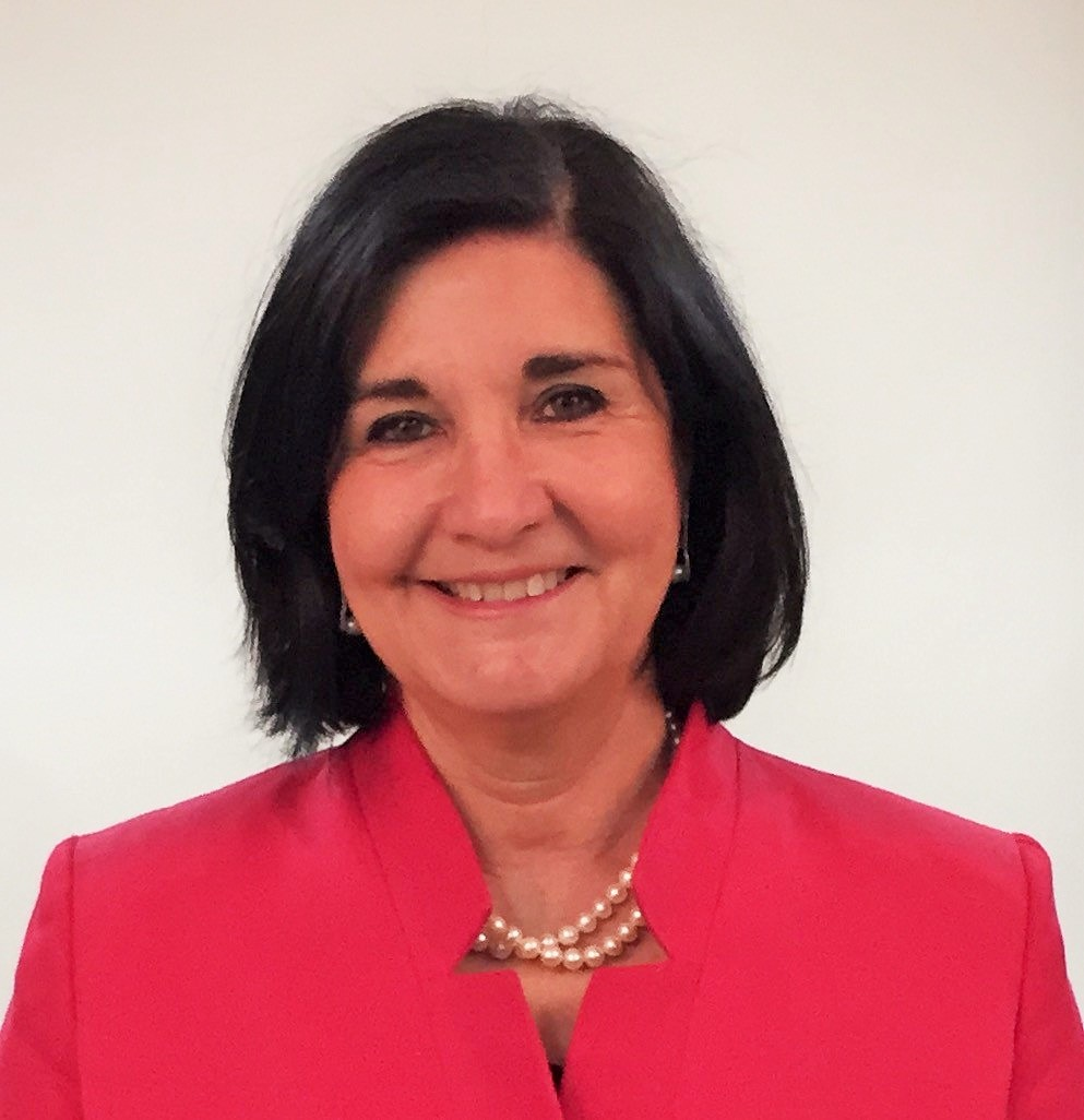 Glòria Pérez Salmerón 2015